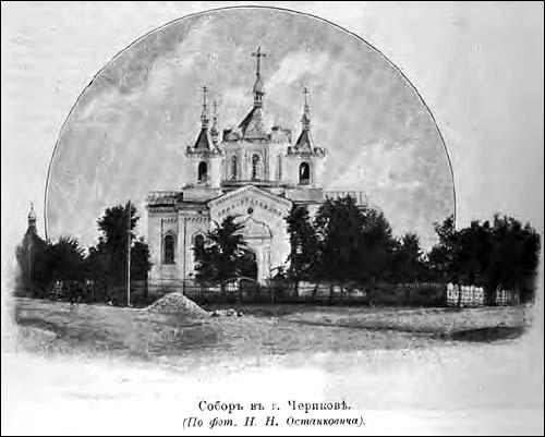 Чэрыкаўскі сабор